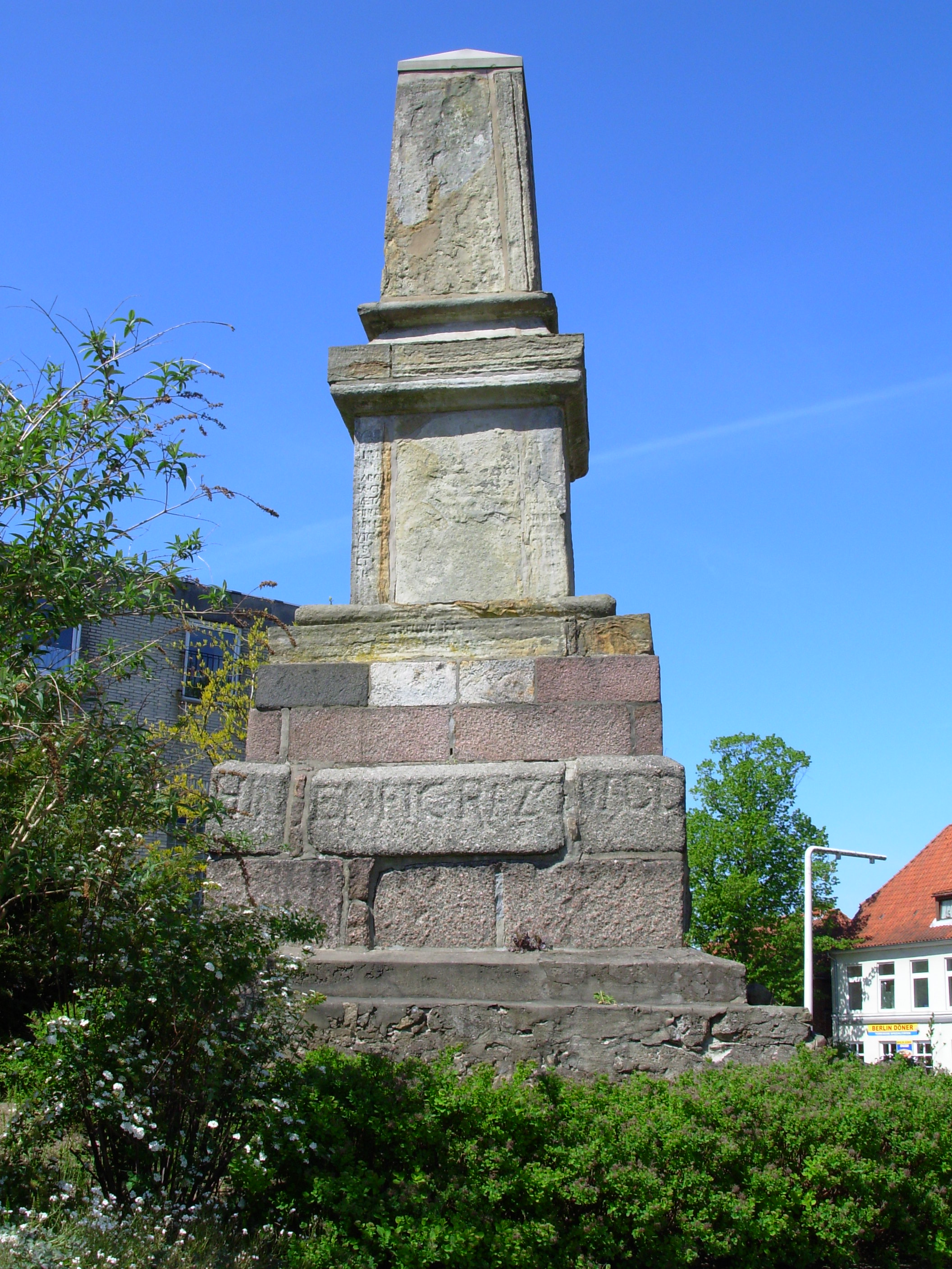 Sockel des Rantzau-Obelisken in Segeberg